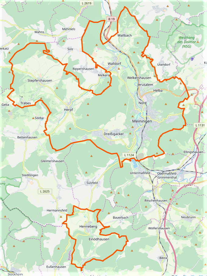 Stadt Meiningen mit Ortsteilen